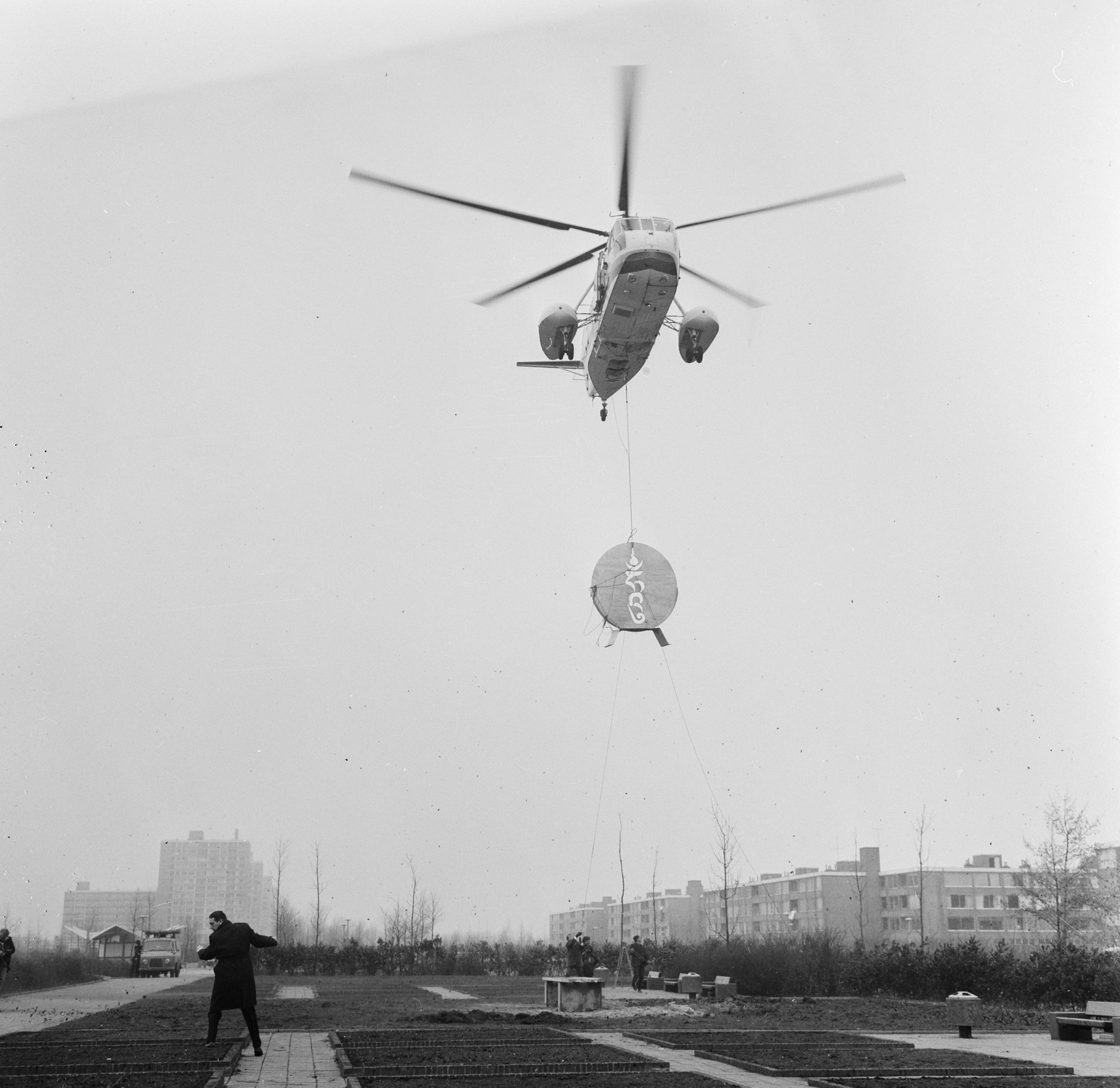 Collectie / Archief : Fotocollectie Anefo Reportage / Serie : [ onbekend ] Beschrijving : Opdracht Gemeente Amsterdam, Kunstwerk "The Long Hum", hangend aan helicopter, wordt geplaatst in Gijsbrecht van Aemstelpark Datum : 7 maart 1969 Locatie : Amsterdam, Noord-Holland Trefwoorden : helicopters, kunstwerken Persoonsnaam : Gijsbrecht van Aemstelpark Fotograaf : Mieremet, Rob / Anefo Auteursrechthebbende : Nationaal Archief Materiaalsoort : Negatief (zwart/wit) Nummer archiefinventaris : bekijk toegang 2.24.01.03 Bestanddeelnummer : 922-1790